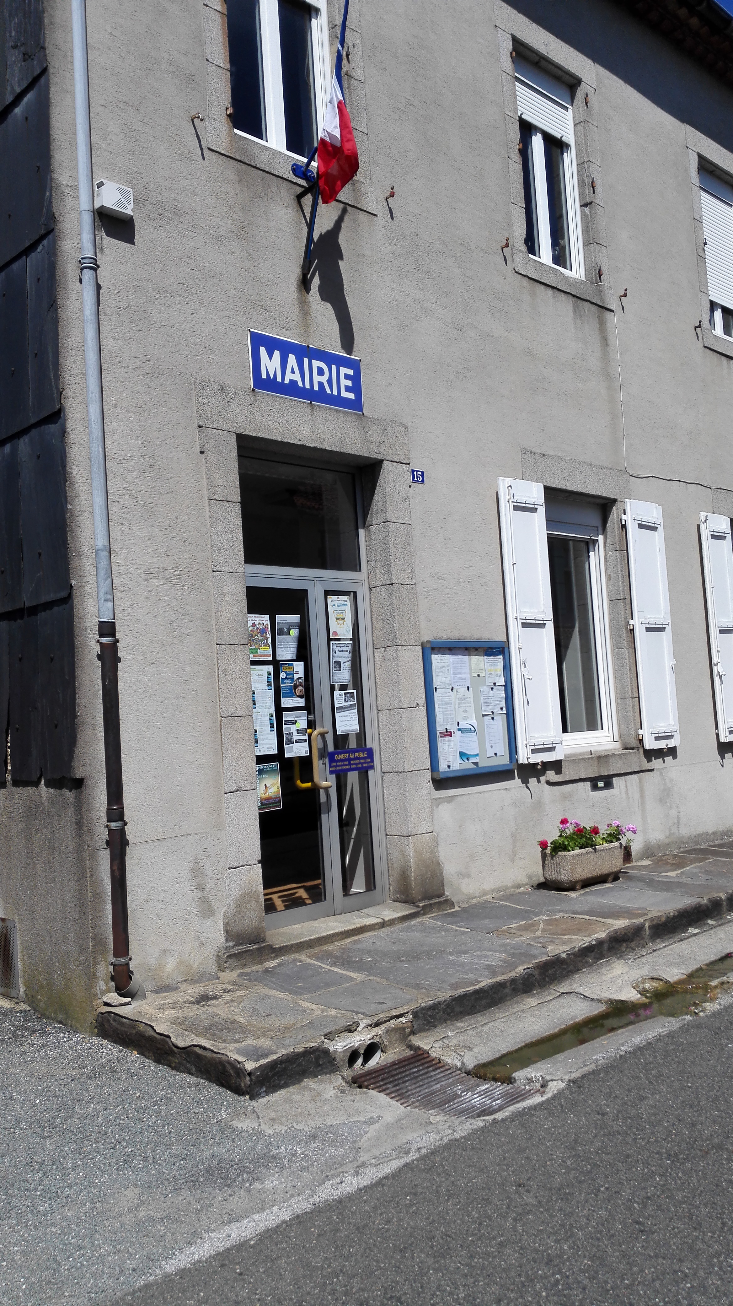 Mairie de LACABAREDE